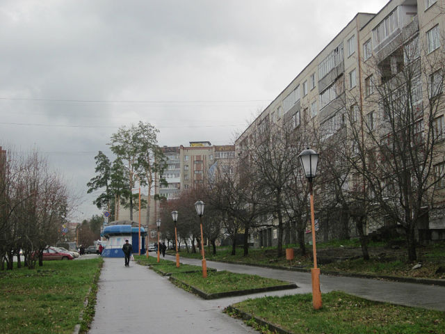 Улица Кузнецова